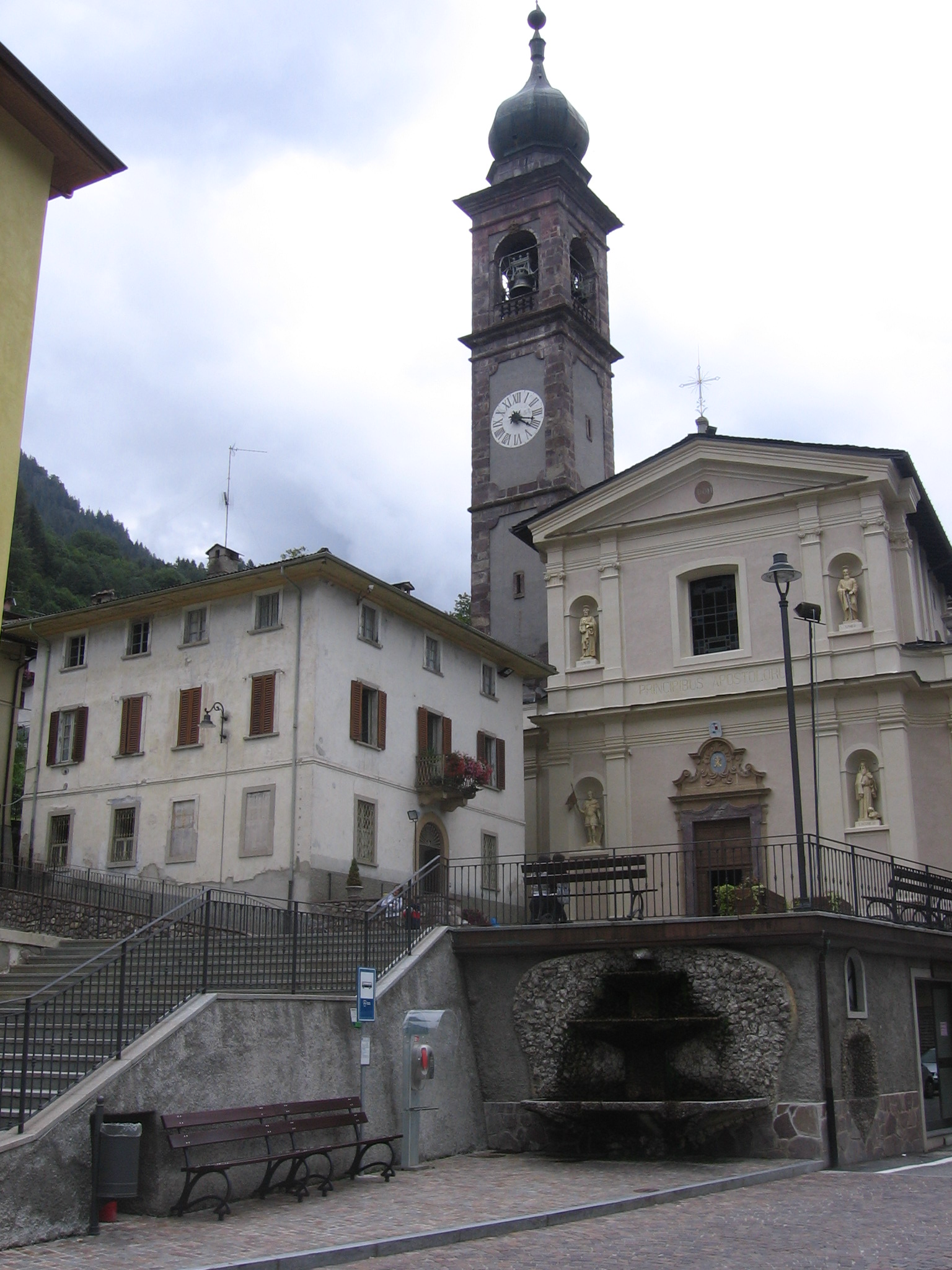 Roncobello, Bergamo, Italy